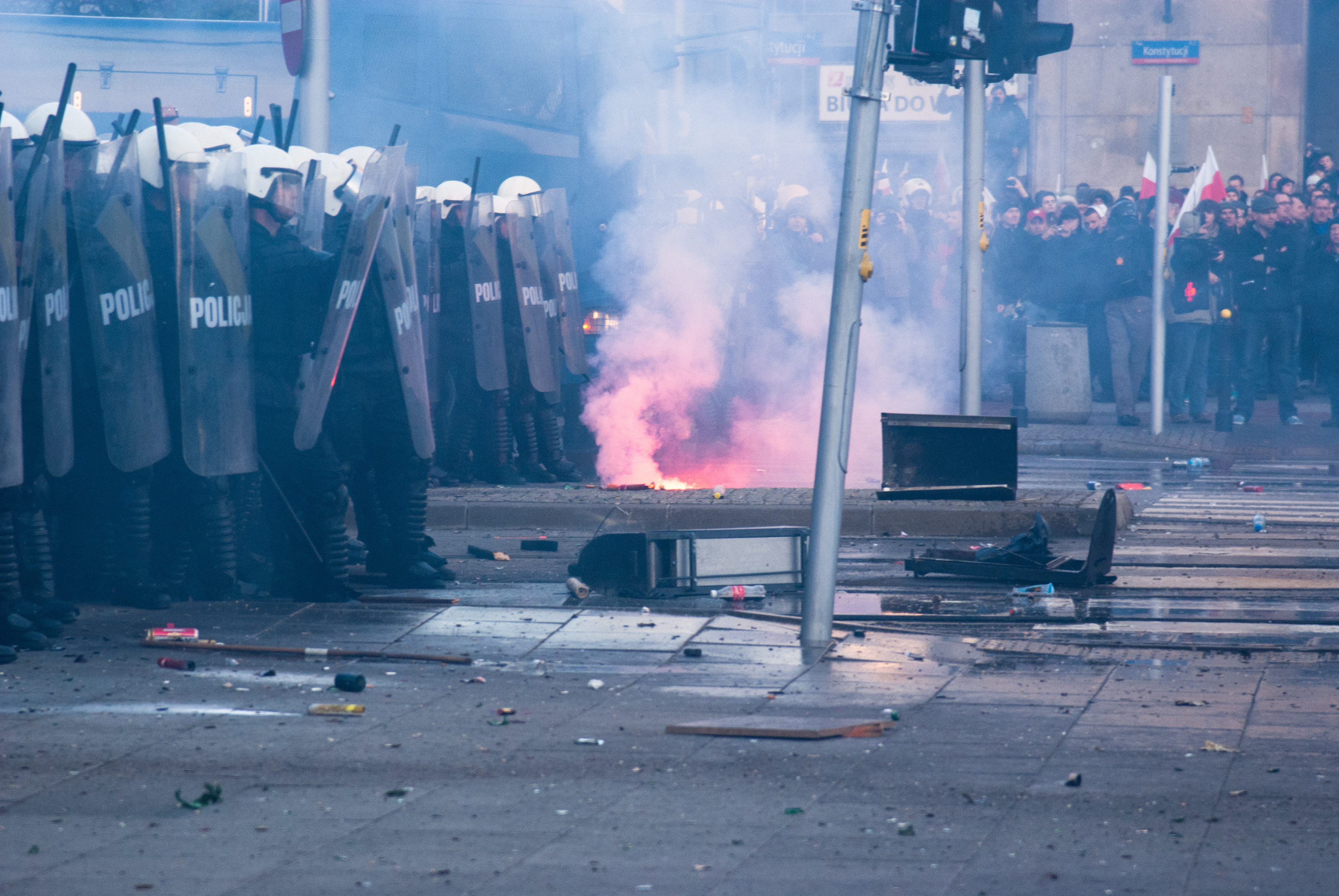 Warszawa, Marsz Niepodległości 2011, Plac Konstytucji